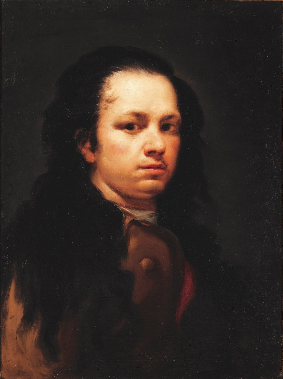 Self-portrait